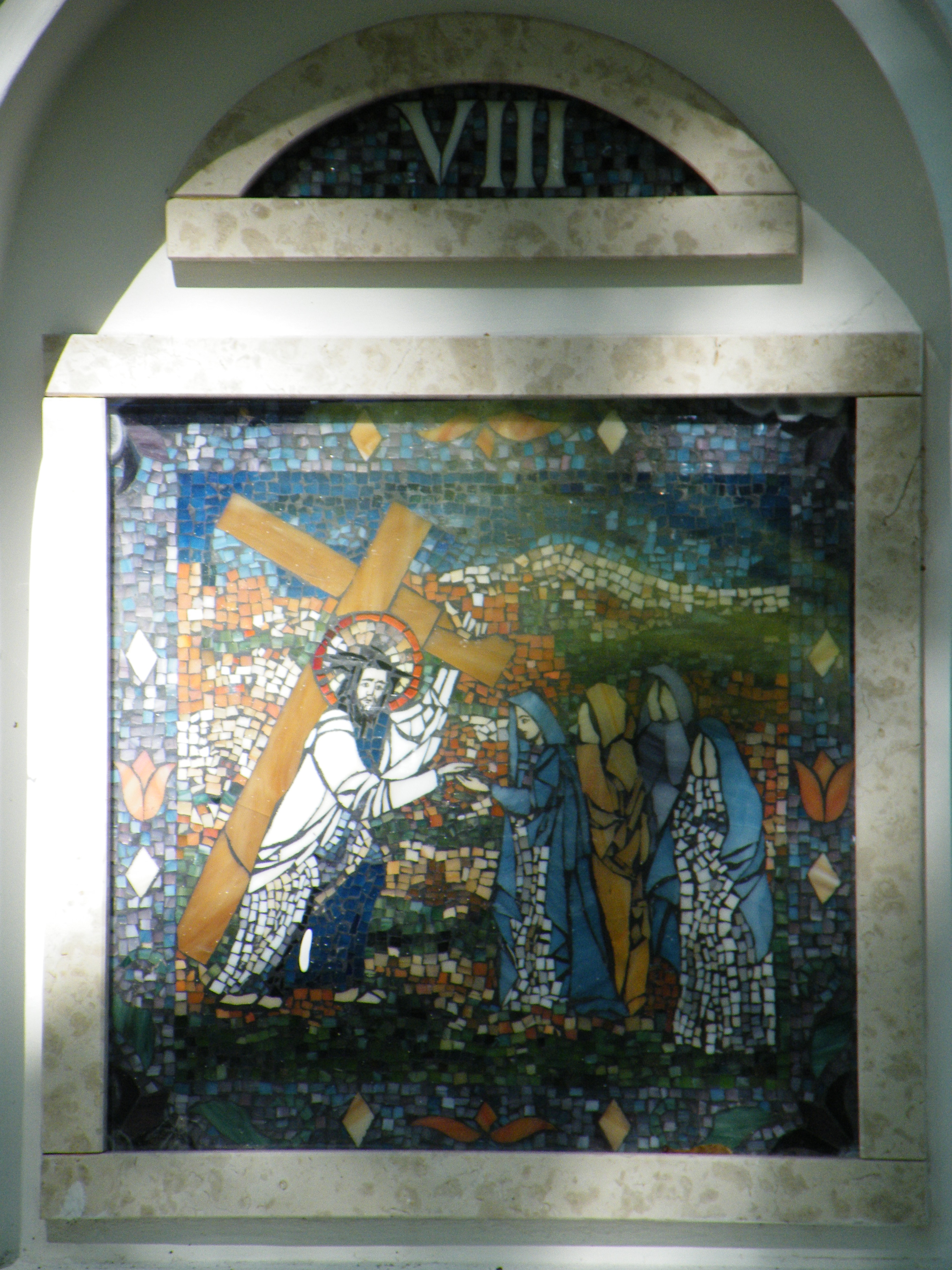 Stációk a Palóc ligetben, Balassagyarmaton